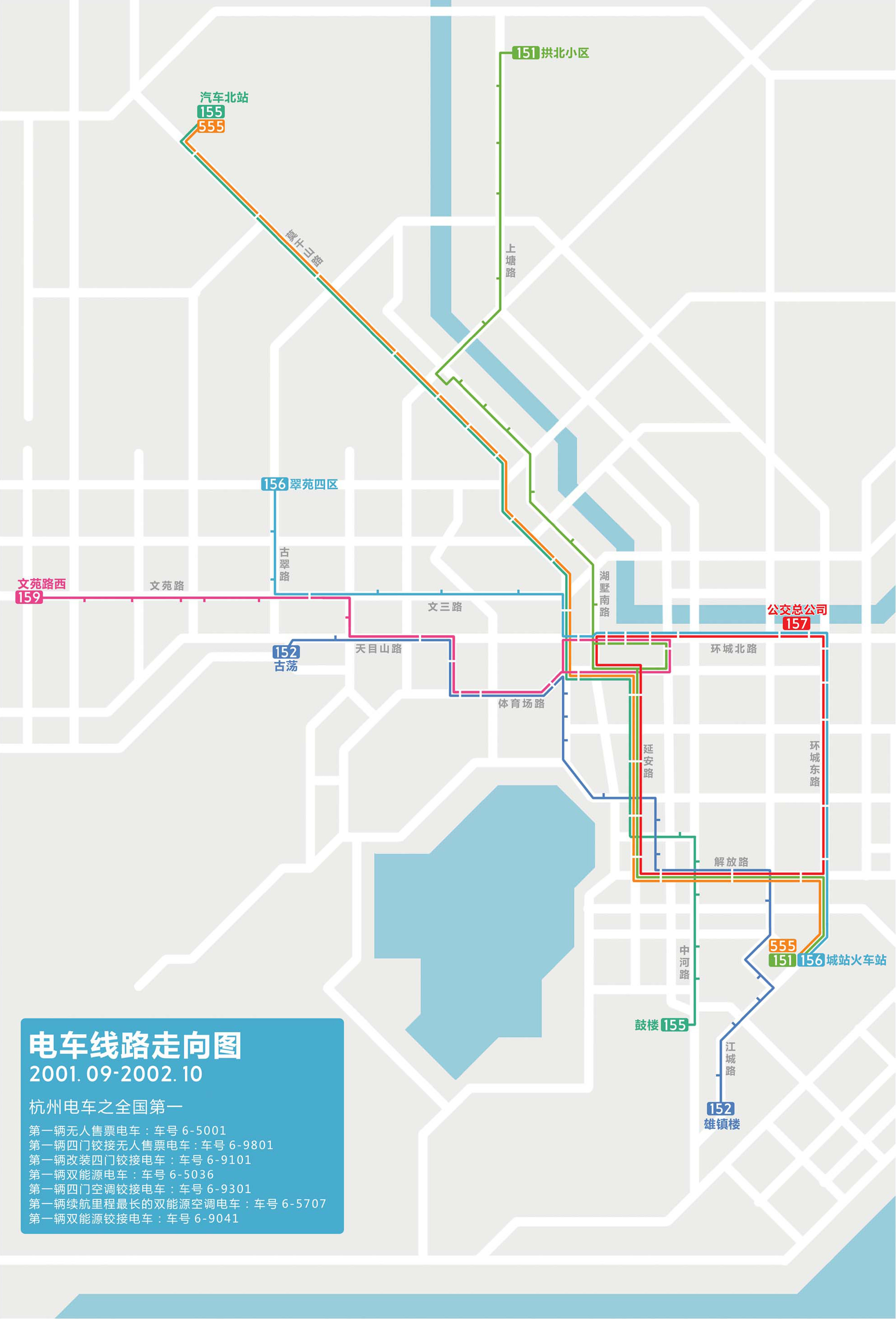 杭州无轨电车发展鼎盛时期线网走向图